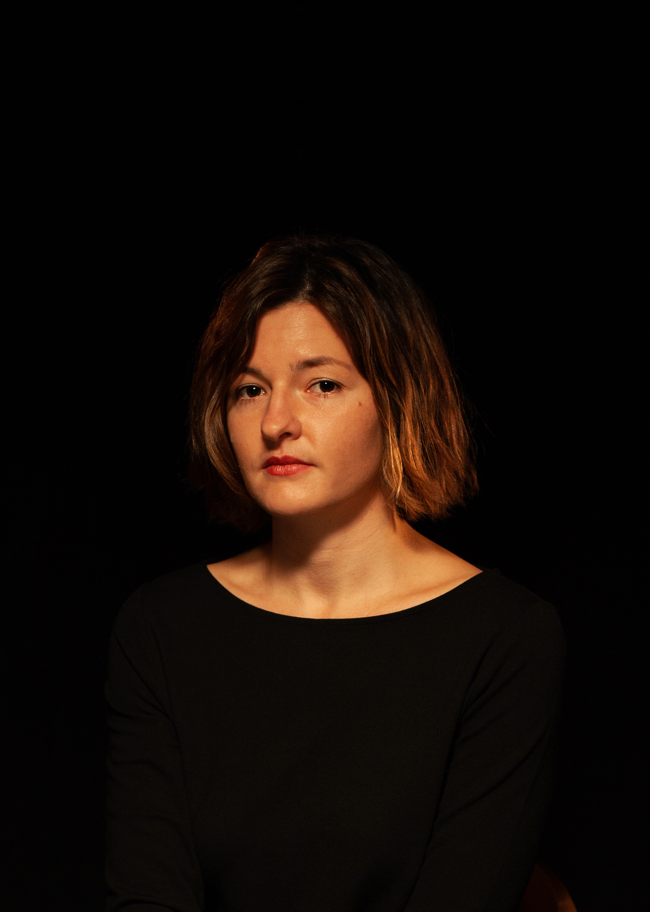 Copyright Marianne Andrea Borowiec. Approved by Laura Freudenthaler.